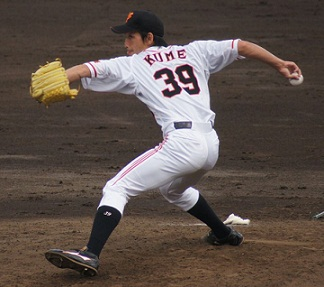 Giants_kume_39